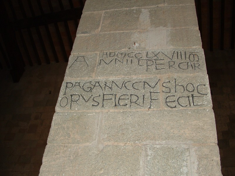 Iscrizione posta all'interno della Pieve di Santa Maria a Lamula